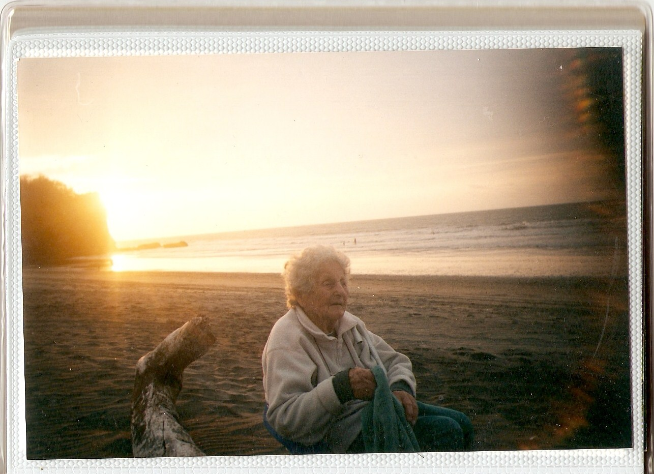 Trude Sojka disfrutaba mucho de las playas ecuatorianas, especialmente de Galápagos, Salinas, Esmeraldas, Manabí